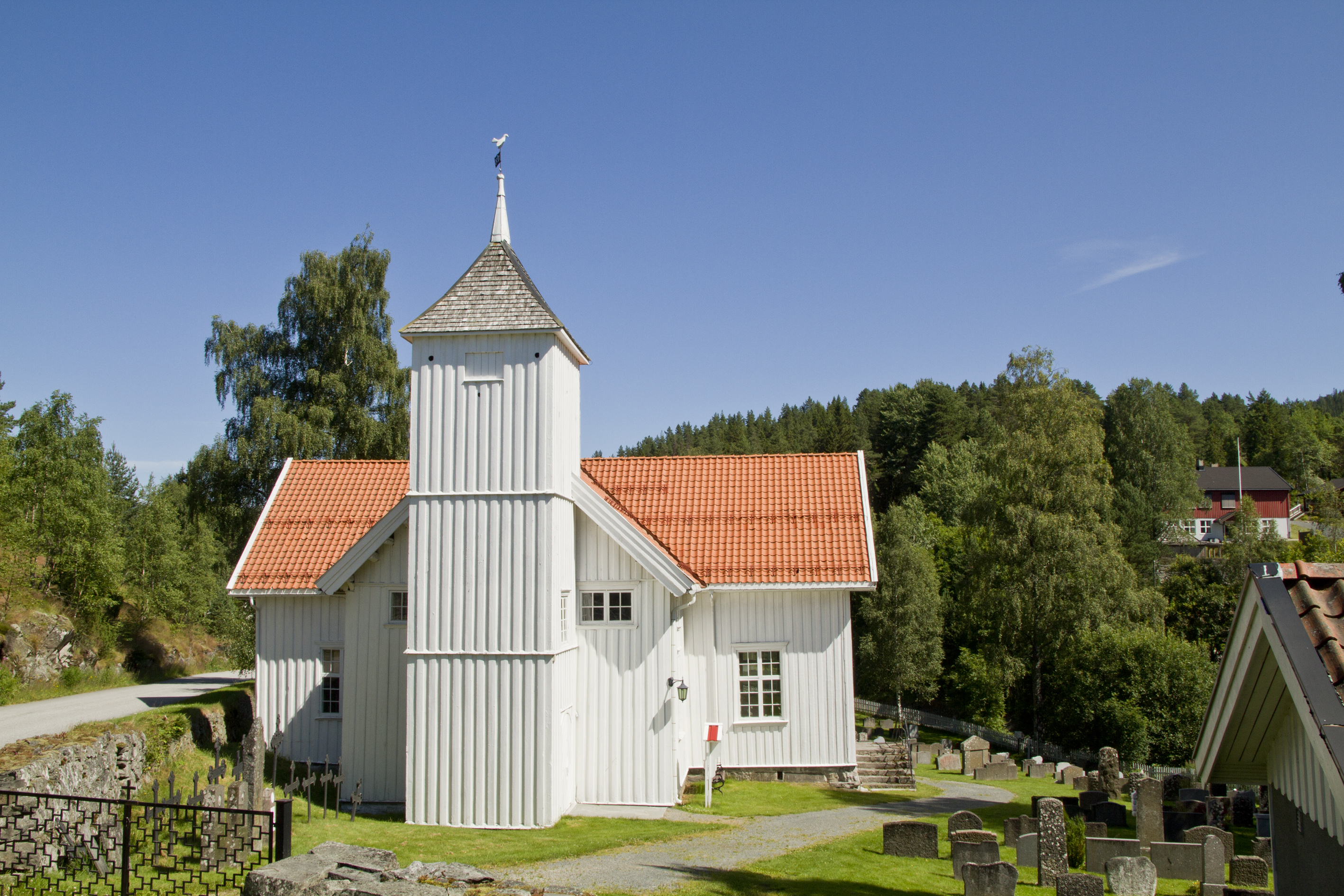 Brunkeberg church